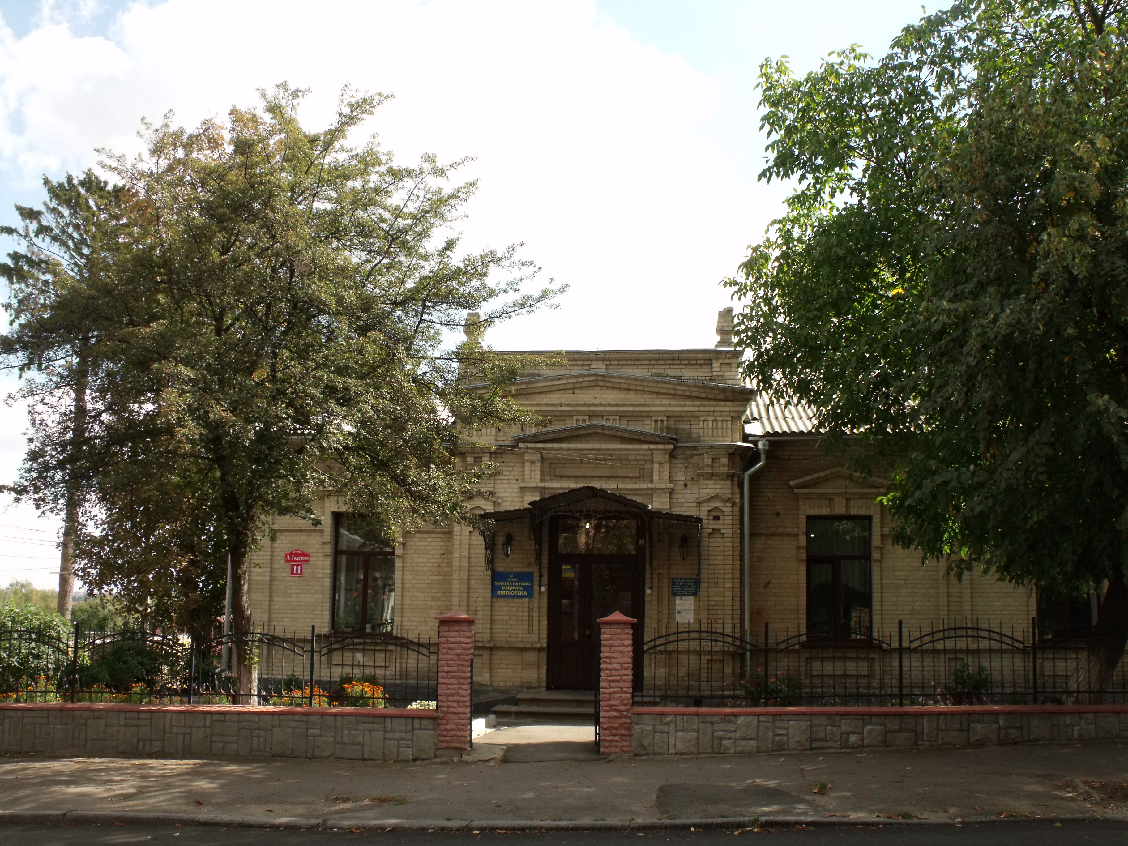 Особняк: Вінниця, вул. Л.Толстого, 11